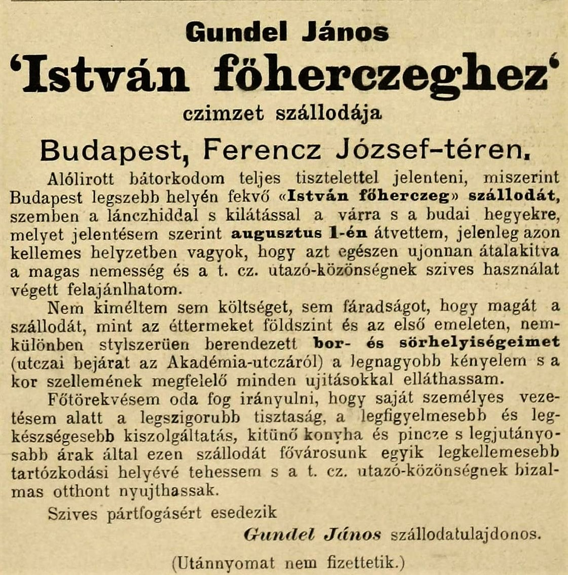 Vadász és Versenylap 1889 szeptember 29, Megnyitási jelentés. Gundel János 'István föherczeghez czimzet szállodája Budapest, Ferencz József-téren